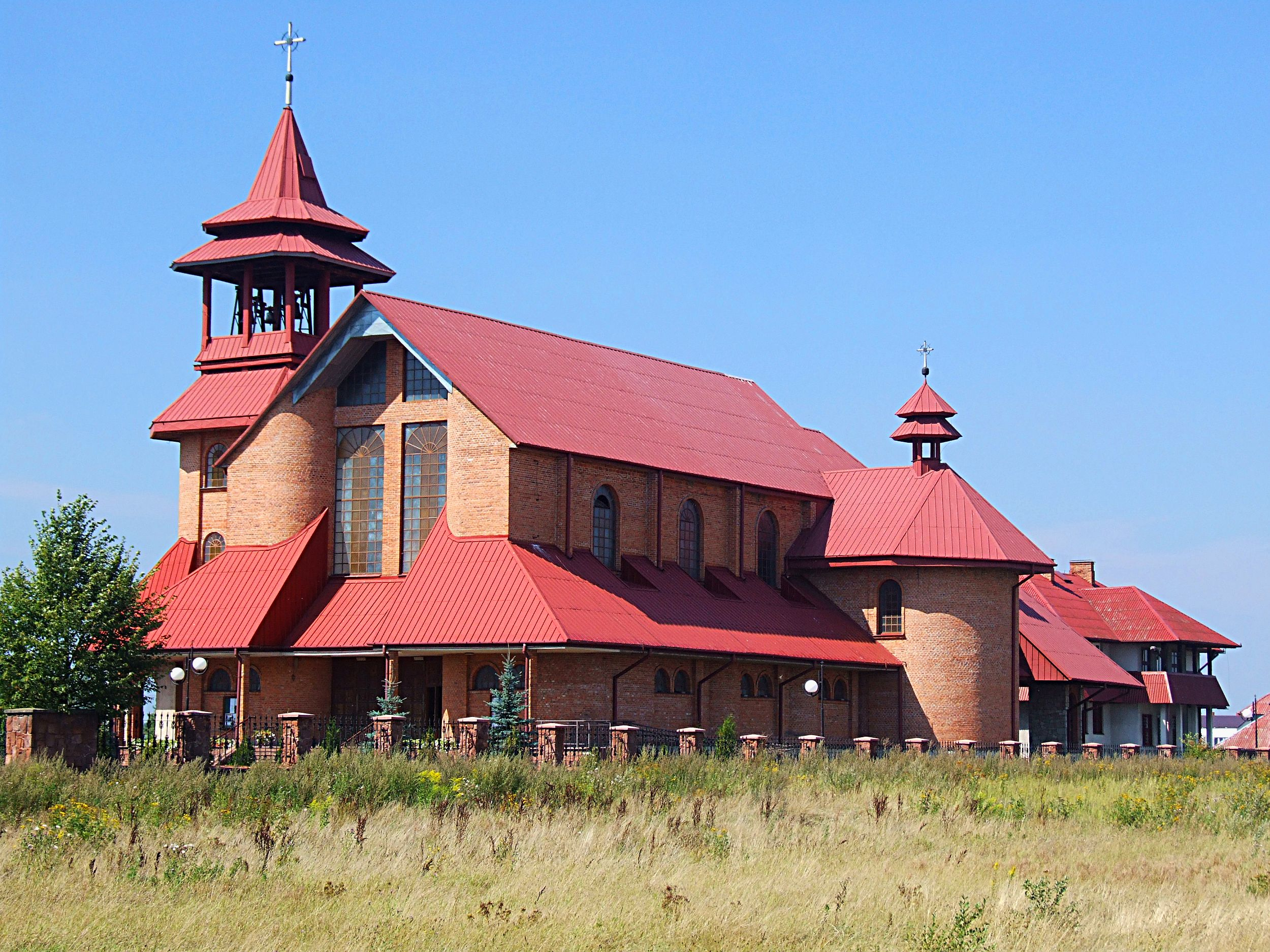 Skarżysko Książęce - Kościół pw. Matki Boskiej Częstochowskiej